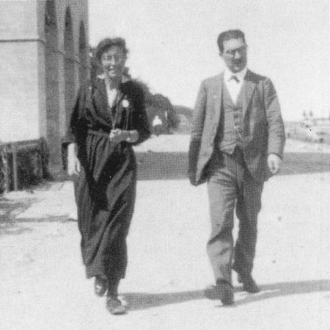 Clara Ragaz-Nadig (1874-1957), et Leonhard Ragaz (1868-1945), théologien suisse.